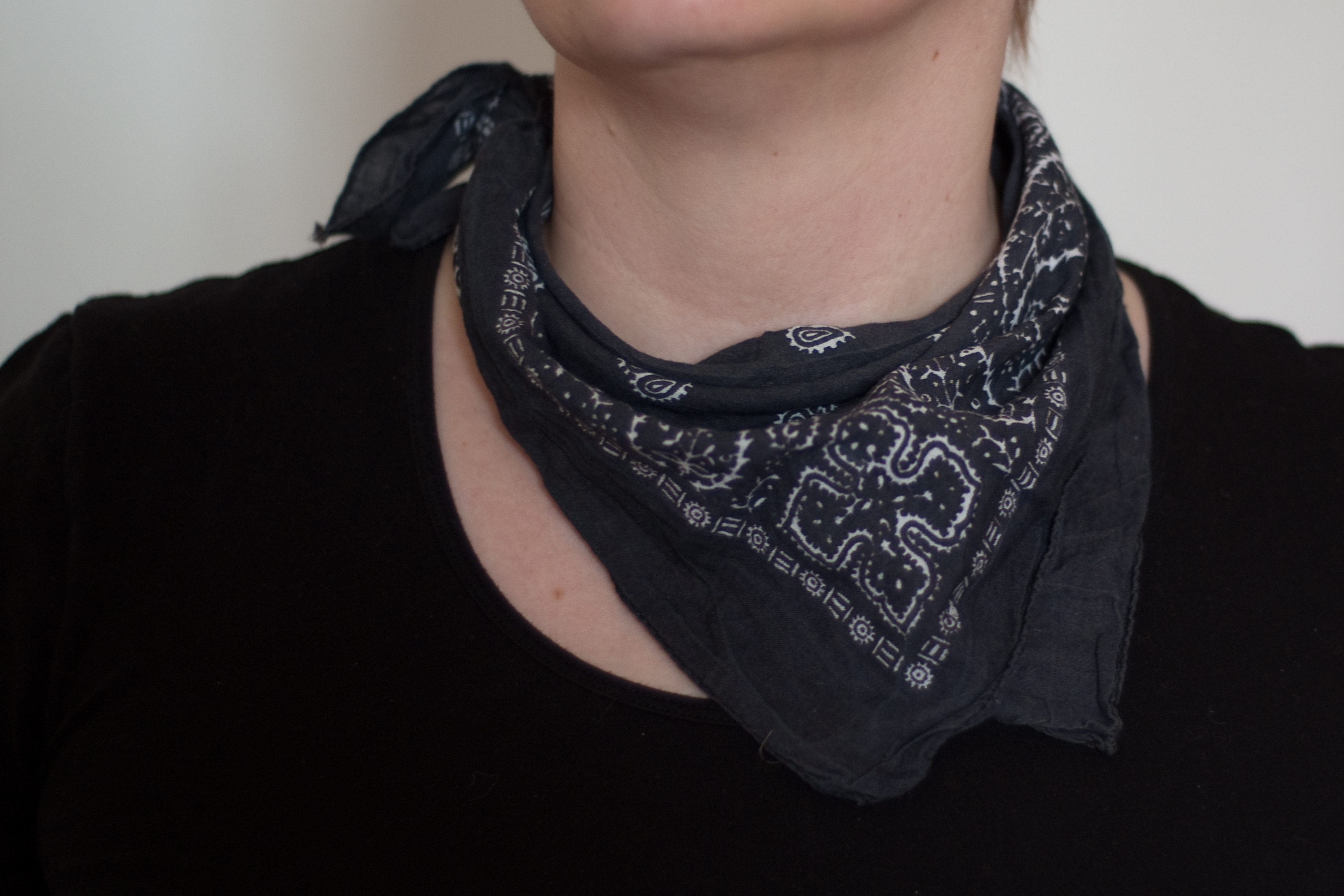 Nickytuch